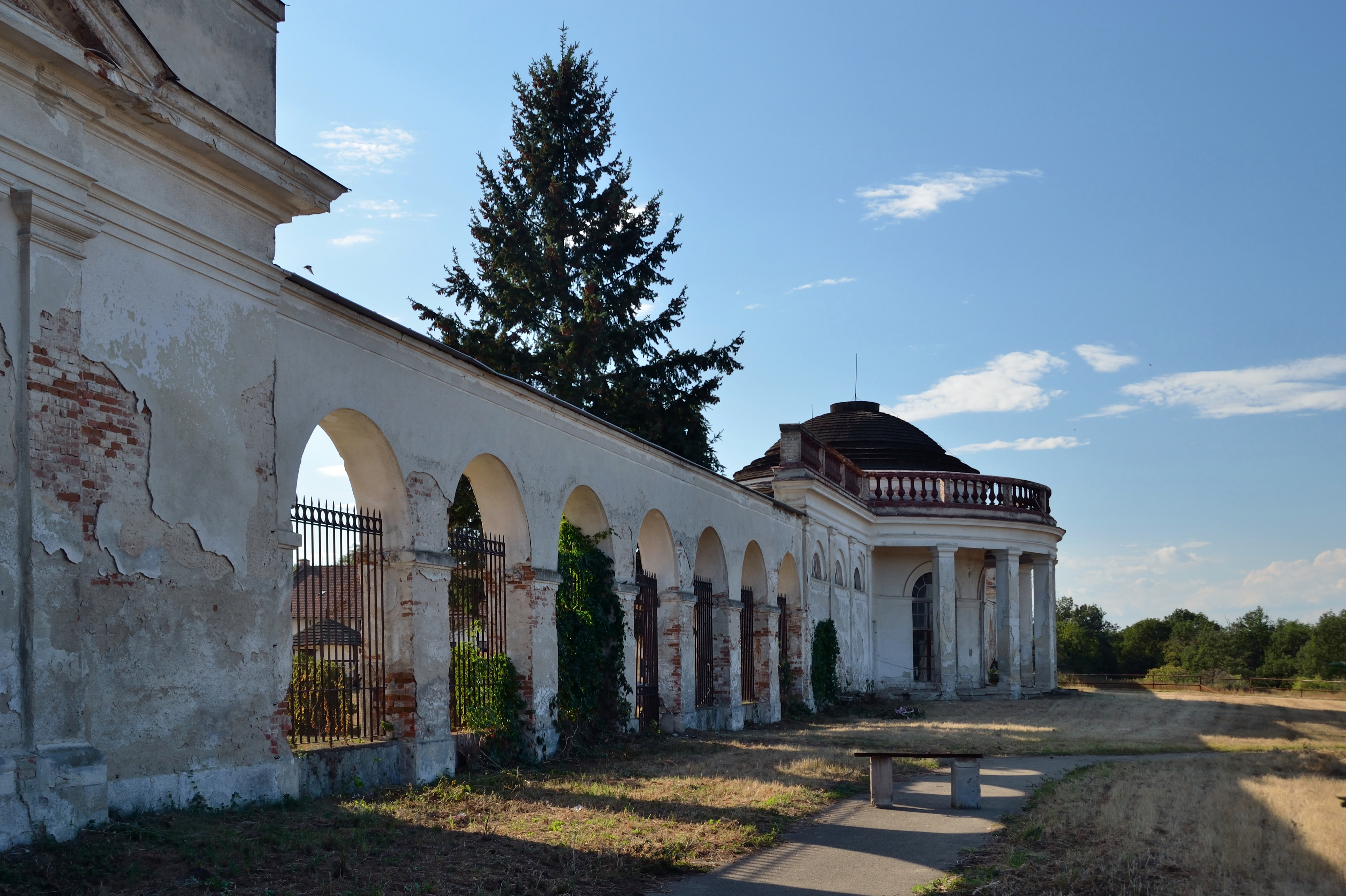 Zemědělský dvůr Nový dvůr (Charvátská Nová Ves), Charvátská Nová Ves